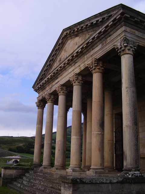 Fachada anterior de la iglesia neoclásica de San Jorge, en la localidad de Las Fraguas, municipio de Arenas de Iguña, comunidad de Cantabria, España